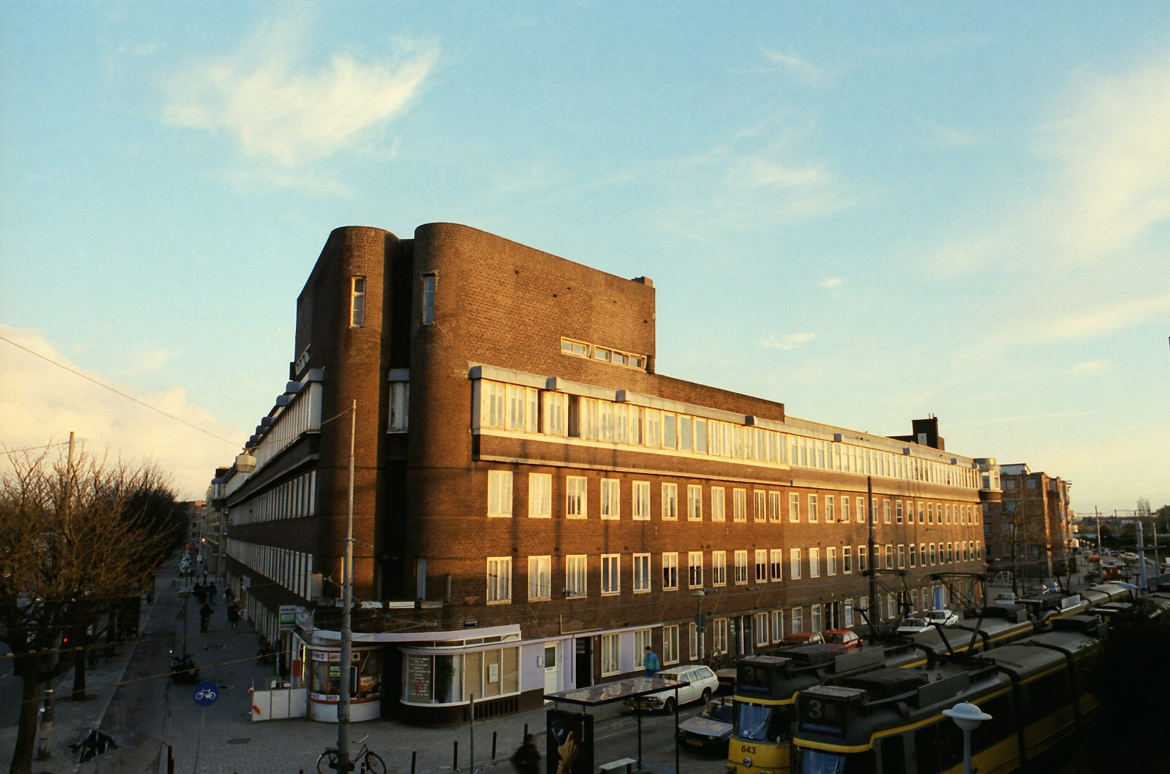 De billen van Wijdeveld is de bijnaam van het gebouw ontworpen door de archtect H.Th. Wijdeveld, de stijl is die van De Amsterdamse School. Hoek van de Celebesstraat en de Insulindeweg. Amsterdam oost. In 1991 is het gebouw gesloopt. A building by dutch architect H. Th. Wijdeveld, seen at sunset. In 1991 it would suffer complete demolition. H. Th. Wijdeveld (Hendrikus Theodorus Wijdeveld) lived from 1885 to 1987.